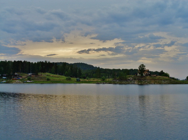 Аргазинское водохранилище, Аргаяшский район This image is related to the protected area of Russia number 7410013